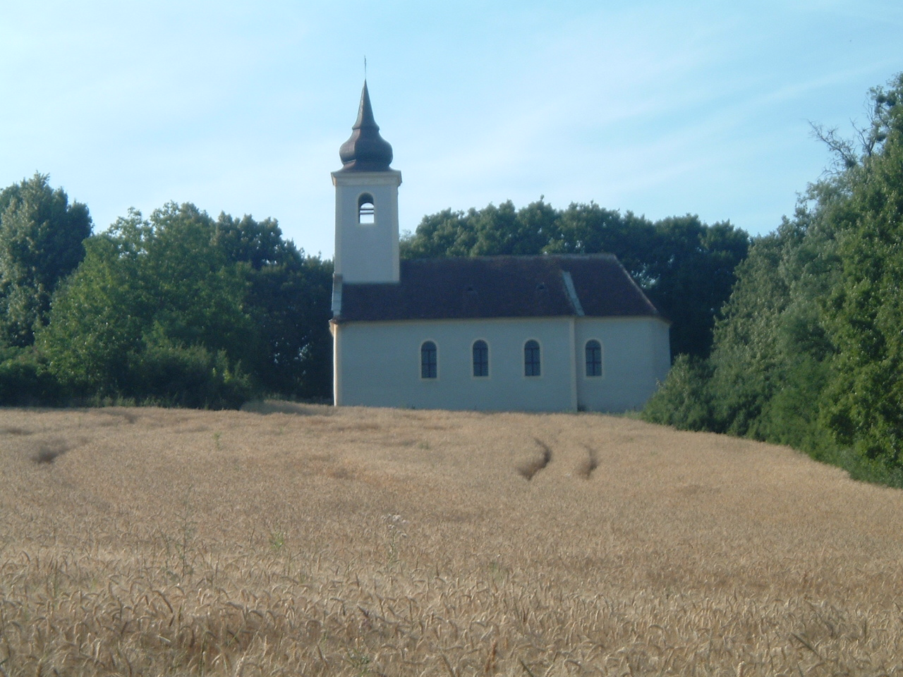 Roman Catholic Churc in Felsőtelekes, Telekes. Kisboldogasszony római katolikus templom